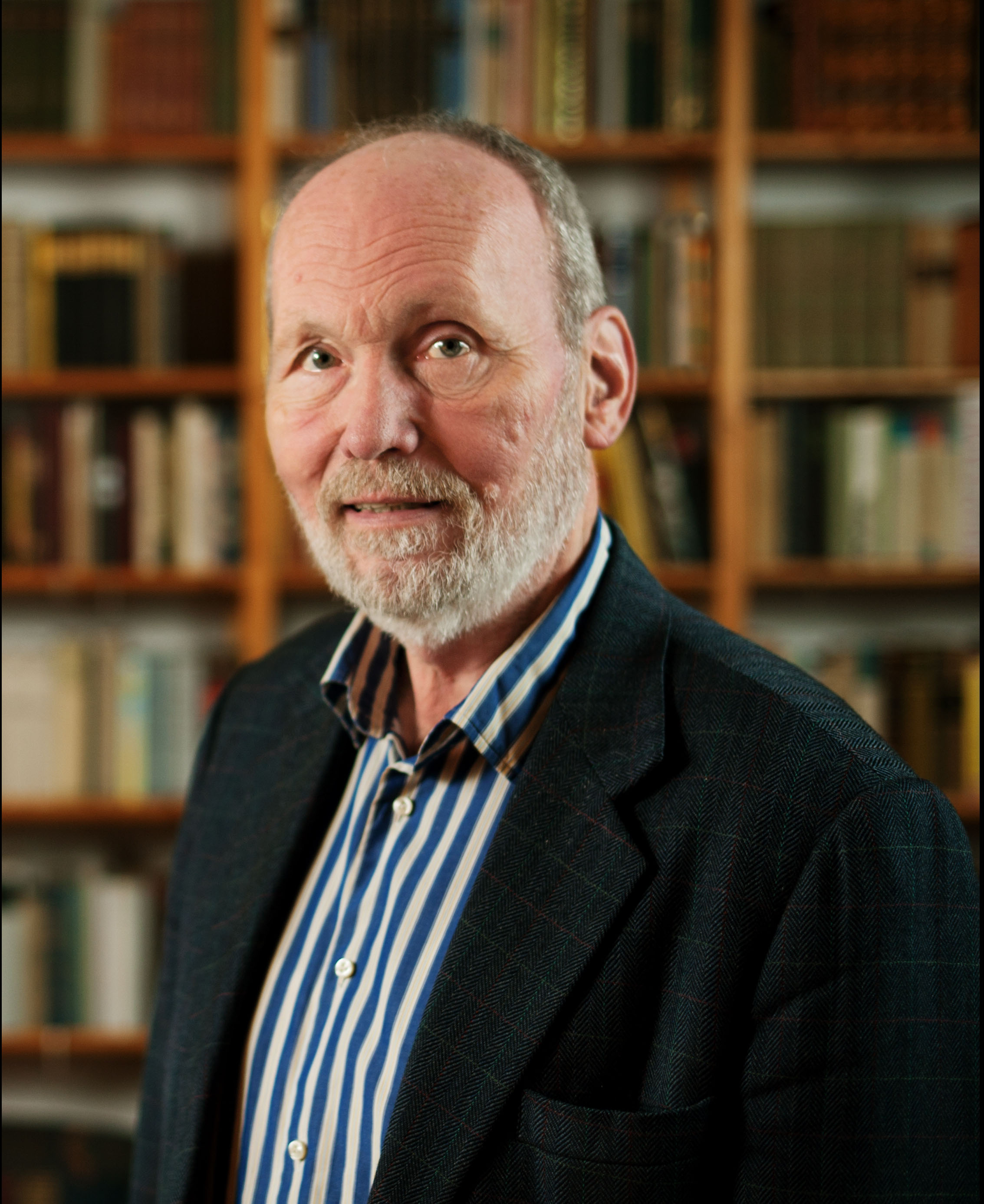 Prof. Dr. Jörg Becker 2011